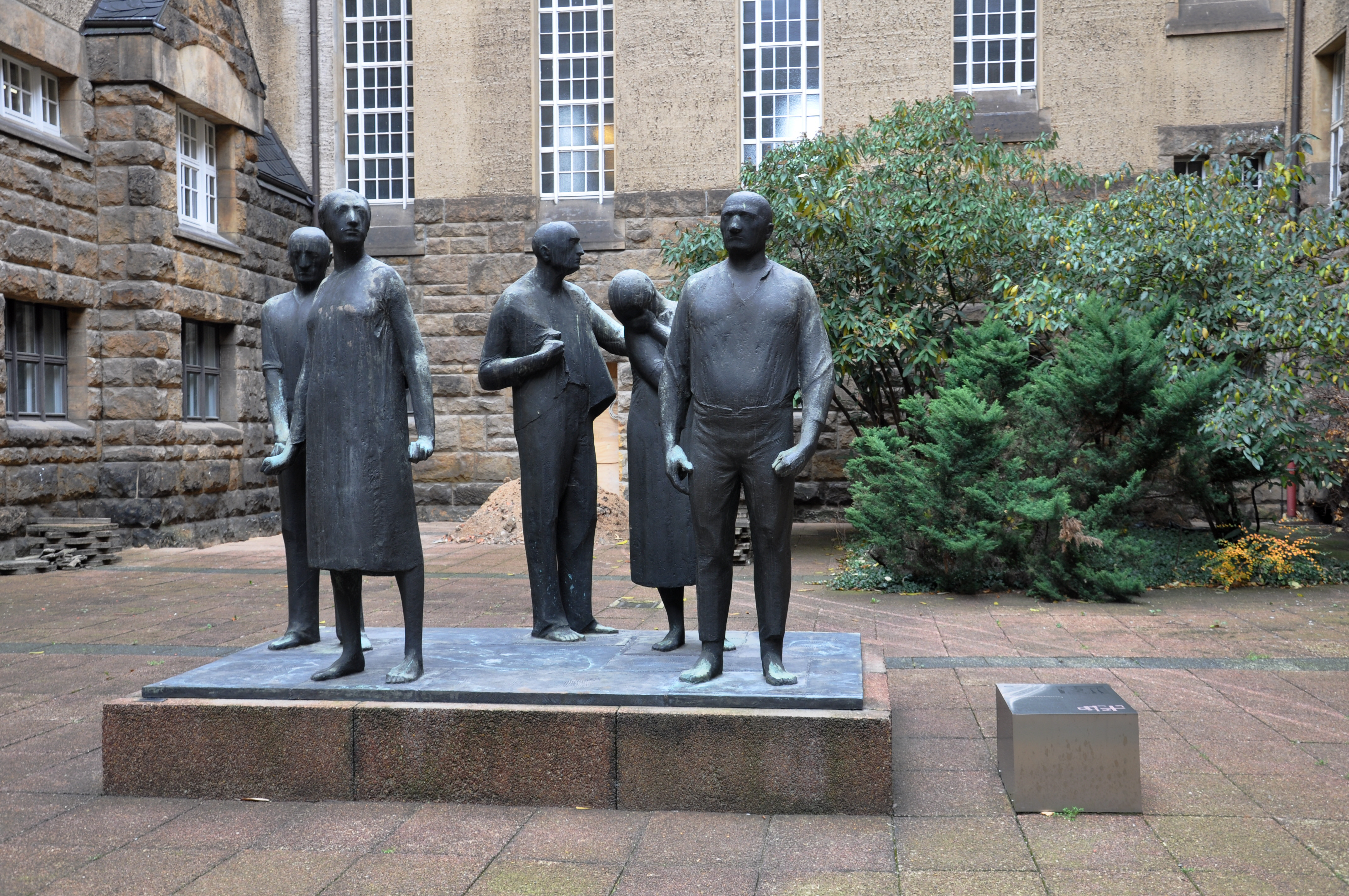 Dresden, Technische Universität (TU) Gedenkstätte Münchner Platz (im Hof des ehemaligen Landgerichtgebäudes, heute Georg-Schumann-Bau), Skulpturengruppe "Widerstandskämpfer" von Arndt Wittig